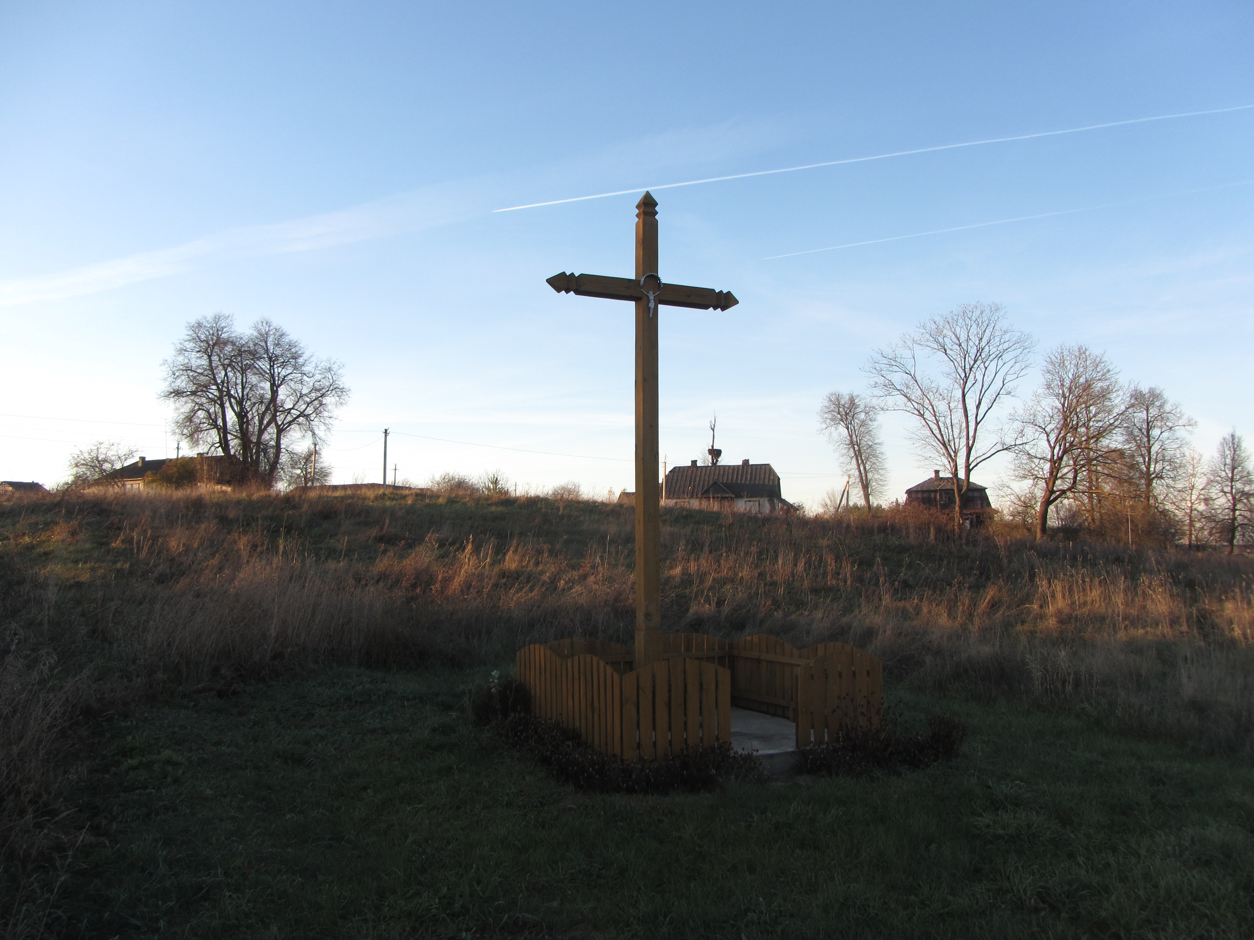 Pabarės sen., Lithuania